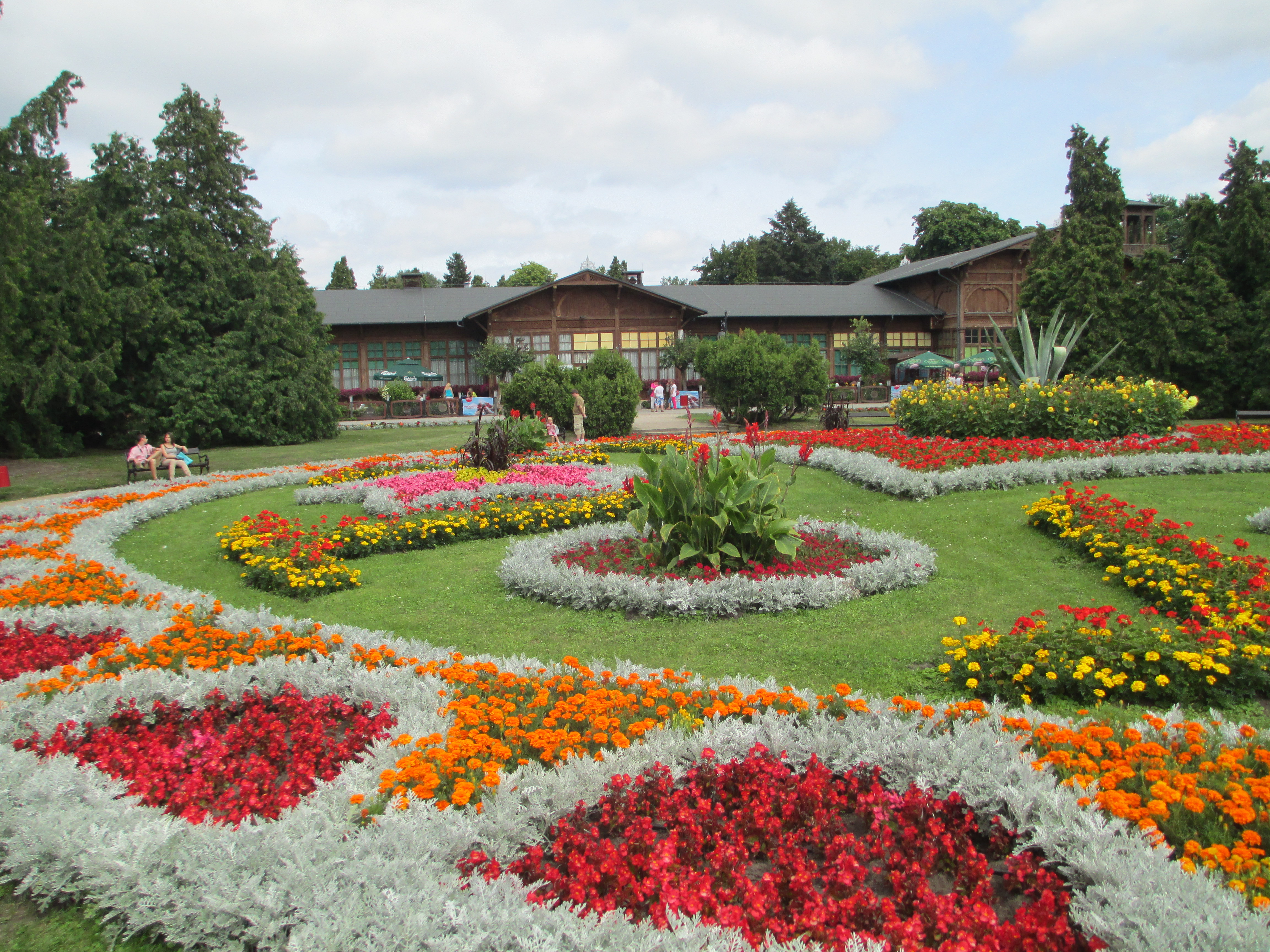 הגן הציבורי המרכזי בצ'יחוצ'ינק, פולין